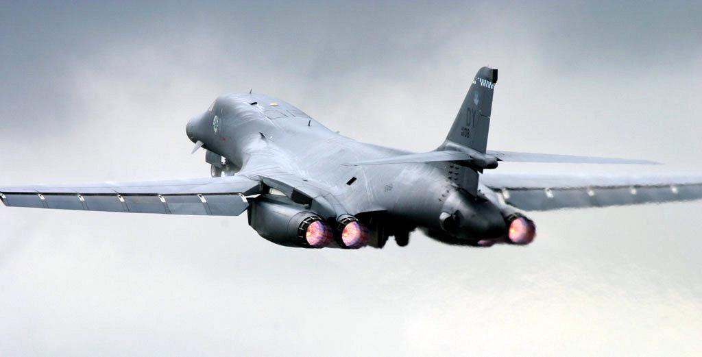 RIAT2004 B-1B